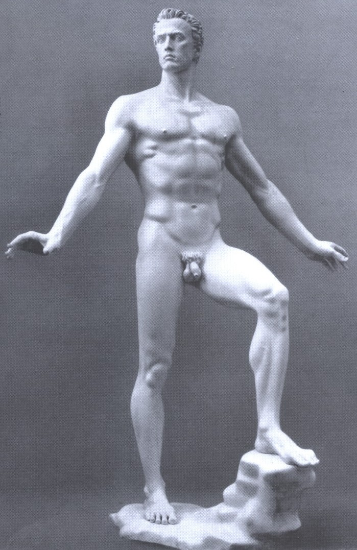 Copyright Museum Arno Breker/MARCO-VG Bonn Op 13.02.07 aan Jos43 door Copyrighthouder schriftelijk toestemming tot Wikipedia-publicatie verleend.